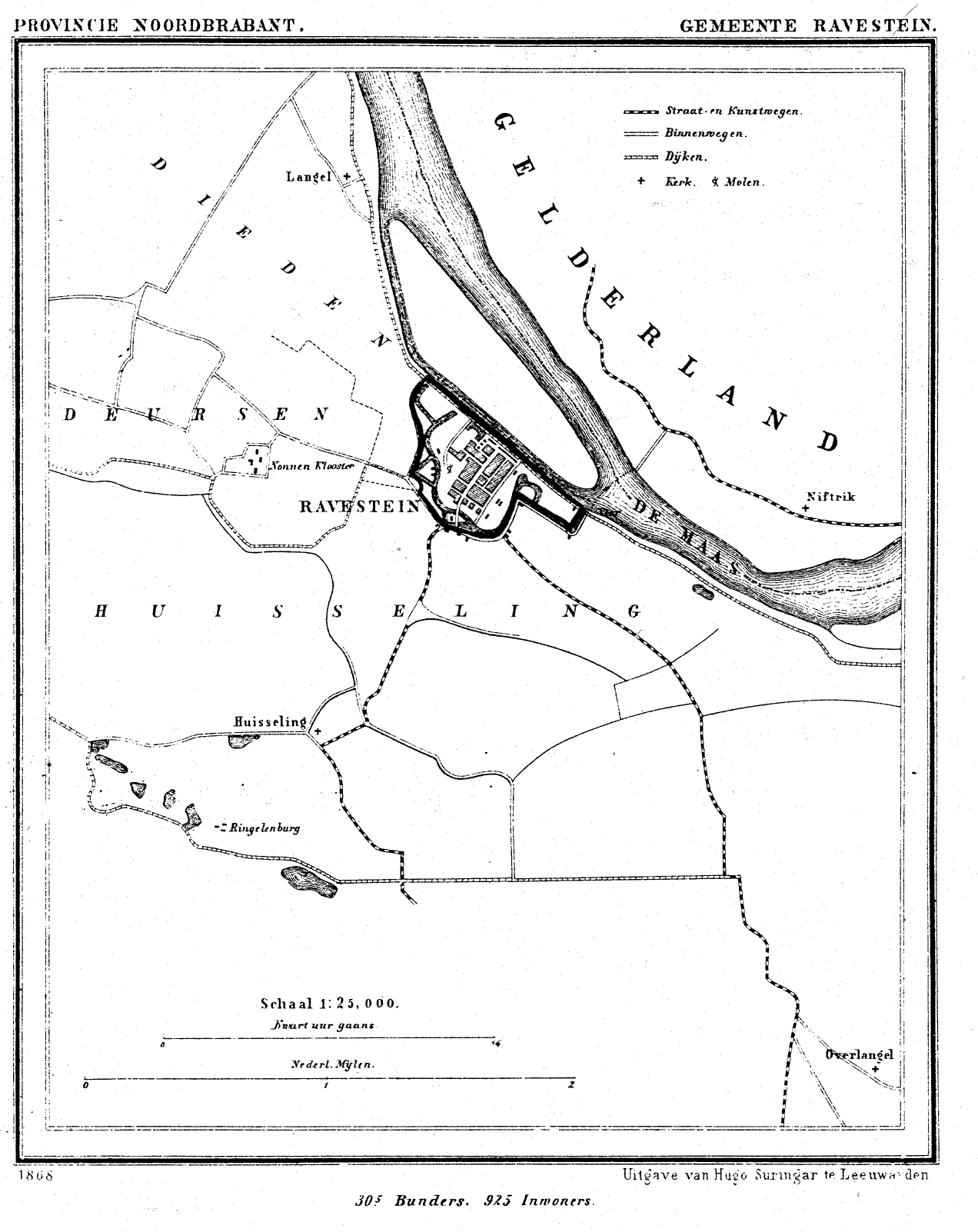 Nederland, Noord-Brabant, Gemeente Ravenstein